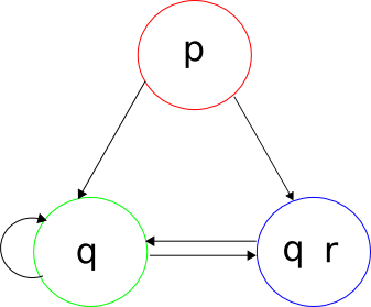 Una estructura de Kripke que está compuesta por 3 estados y sus respectivas transiciones entre ellos.